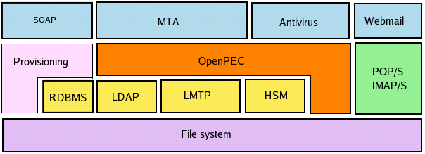 Architettura di un sistema di posta certificata basato su OpenPEC